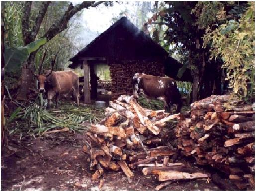 EMPLEO EN CALNALI 2010 SILVICULTURA.JPG